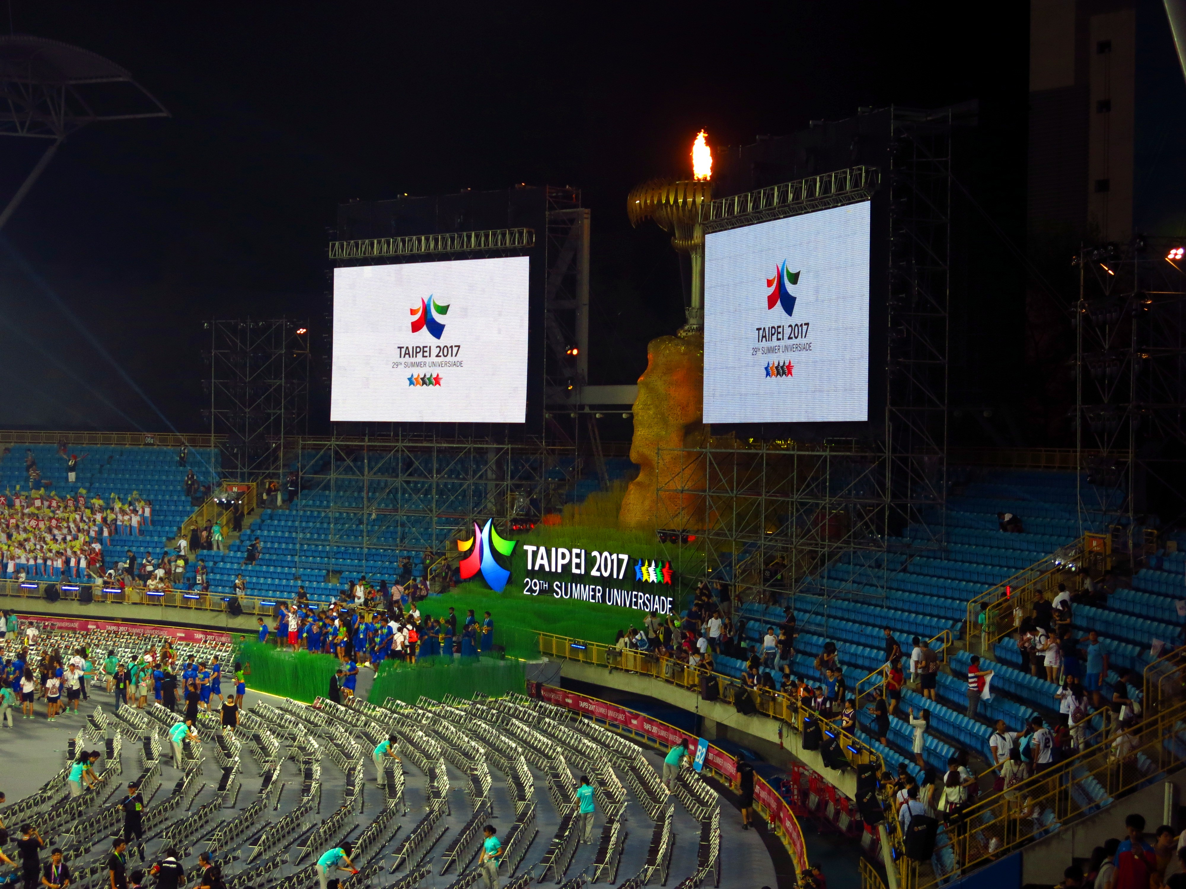 中文（台灣）: 第二十九屆夏季世界大學運動會聖火